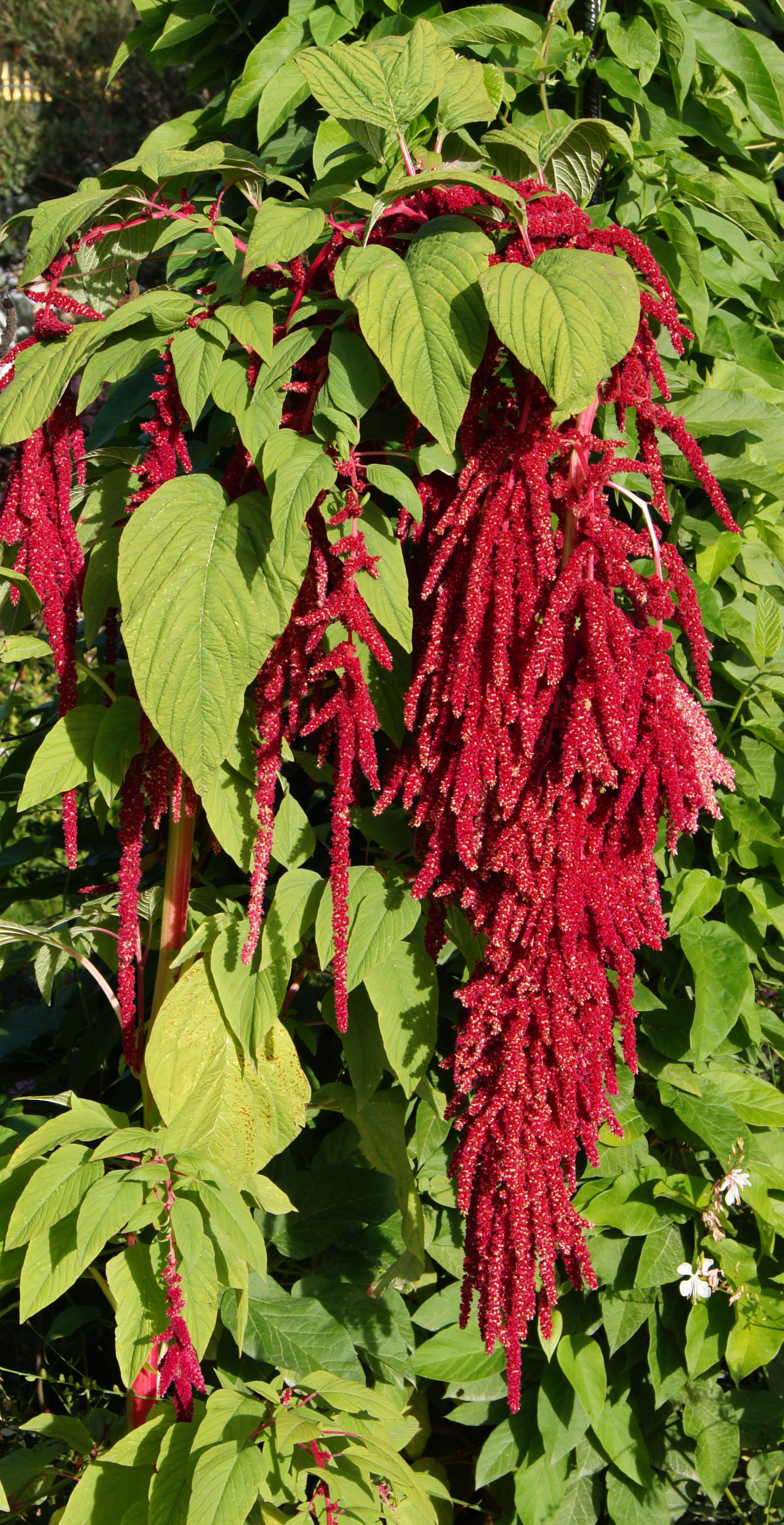 Amaranthus caudatus, Jardin des Plantes de Paris